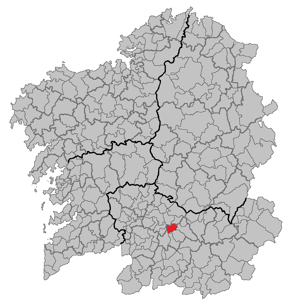 Mapa coa localización do concello de Paderne de Allariz.